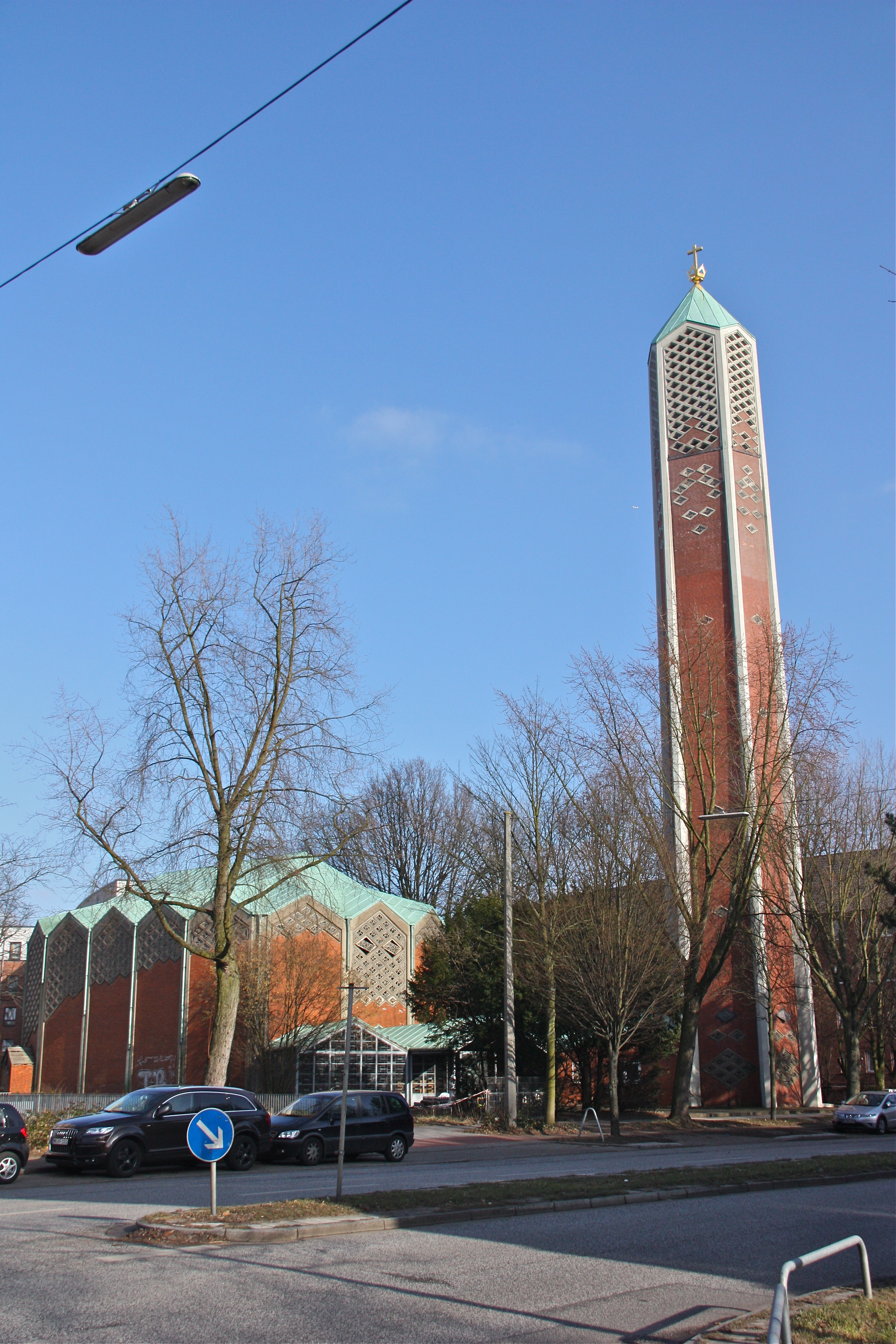 Hamburg, Horn, ehemalige Kapernaumkirche, Blick von der Sievekingsallee